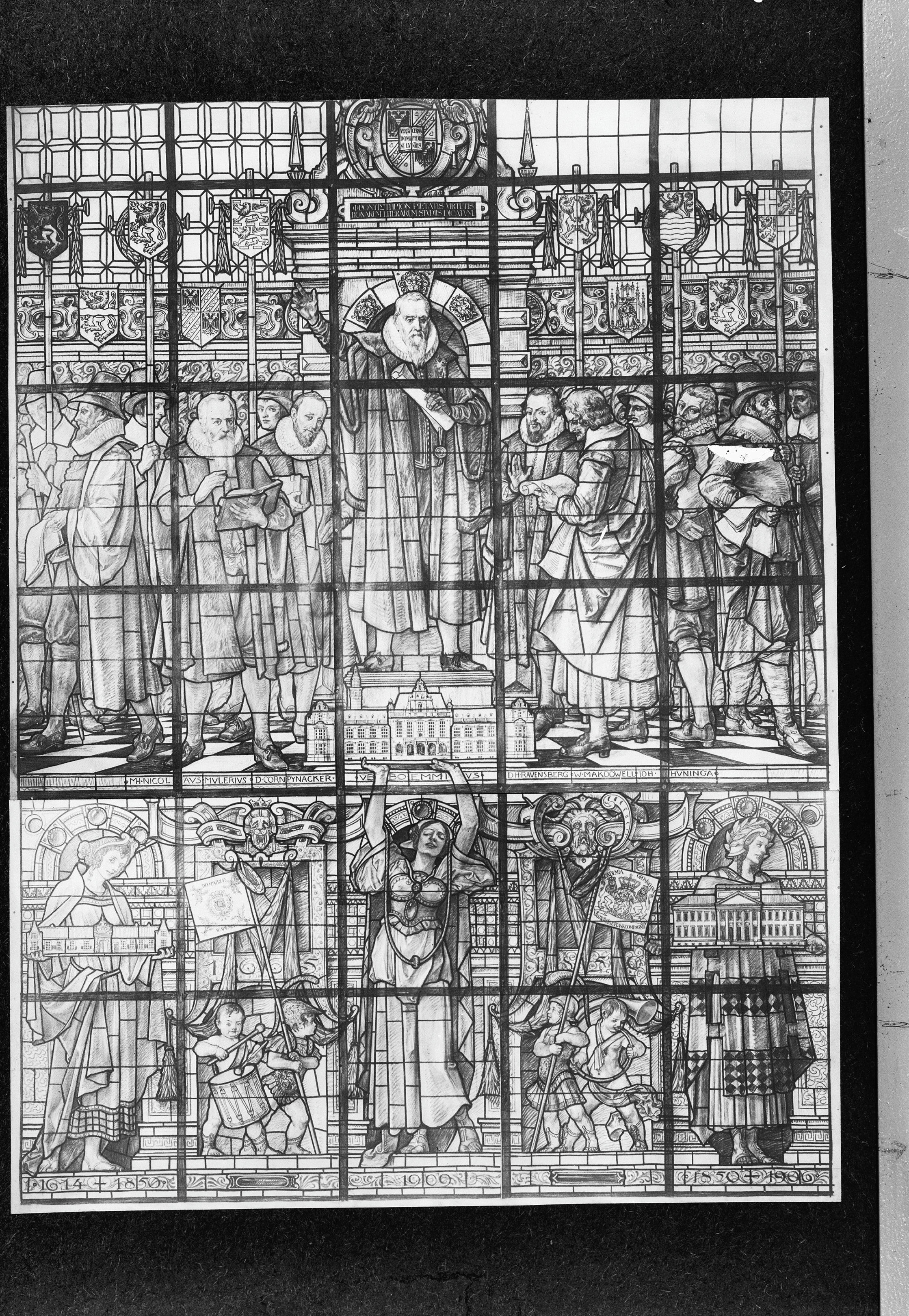 Rijks H.B.S. en Universiteit: Universiteit, gedenkraam